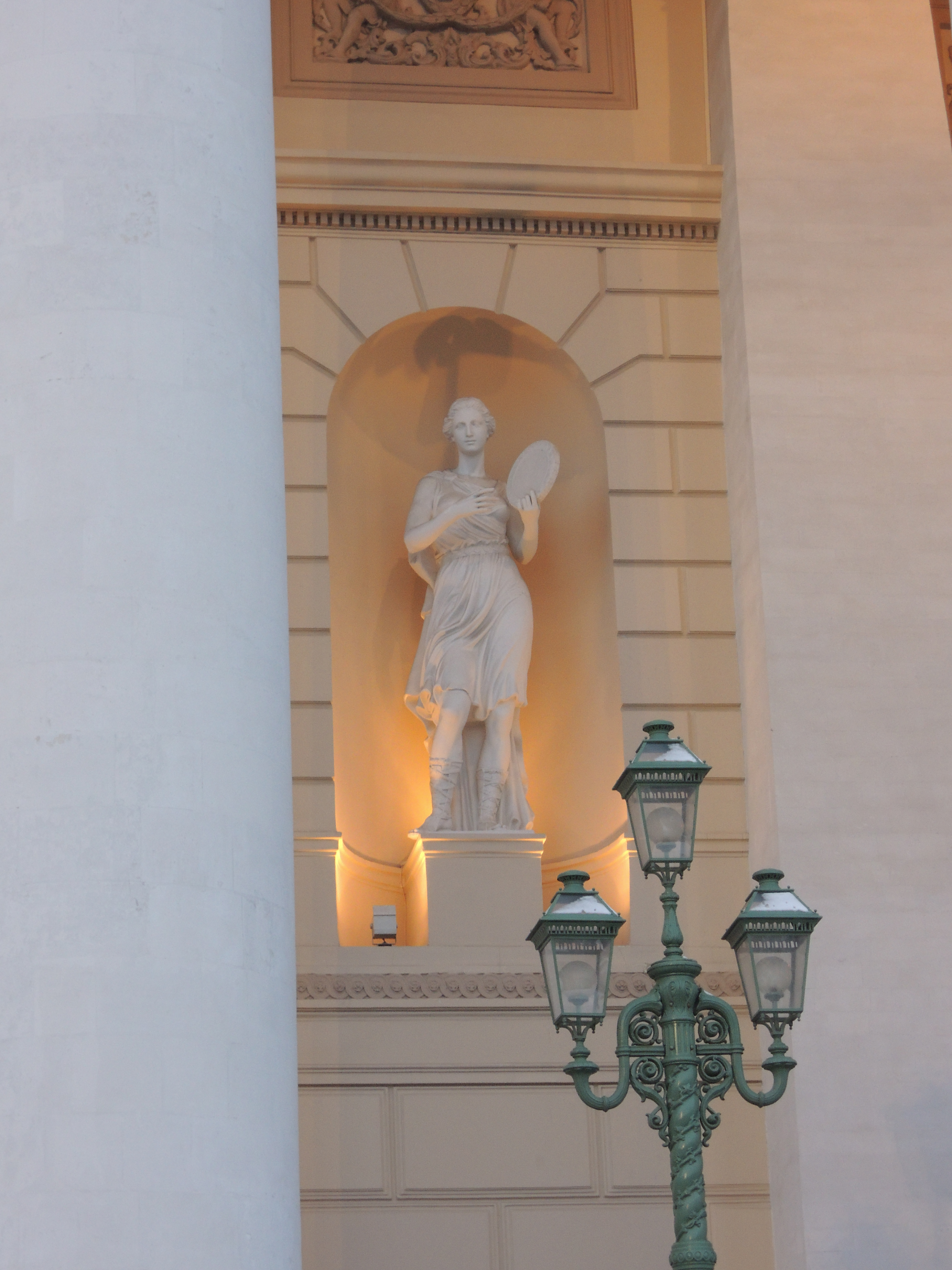 Большой театр